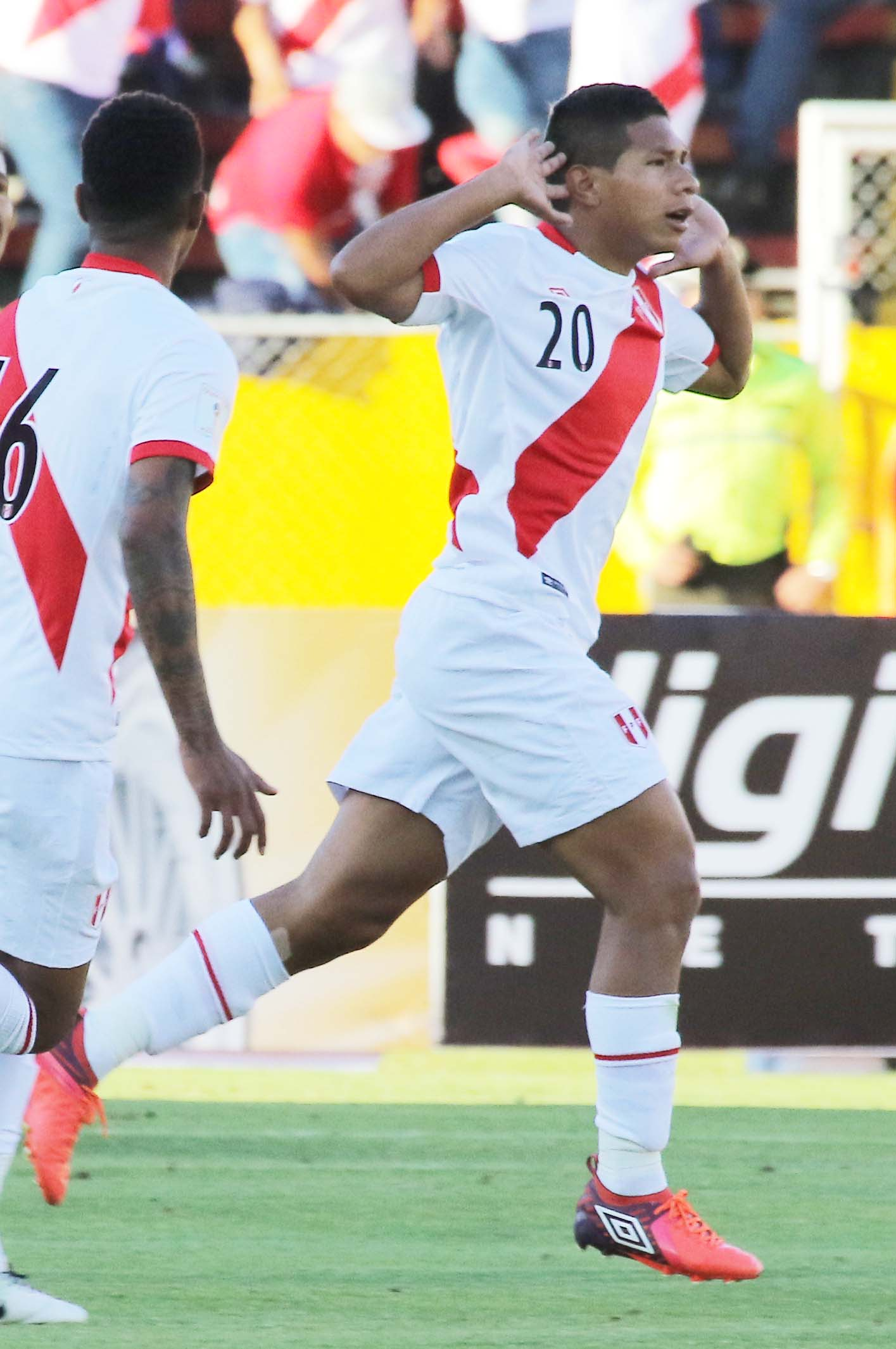 Quito 5 Sep (Andes).- Encuentro por eliminatorias Rusia 2018 entre Ecuador y Perú. Fotografías: Carlos Rodríguez/Andes.